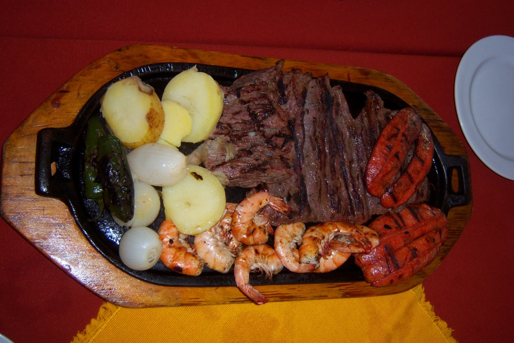 Arrachera beef Mexico ¡La mejor comida de Colima!